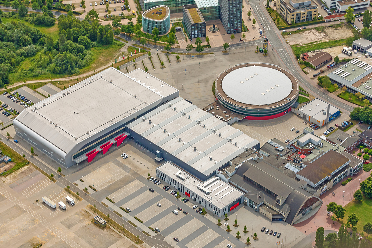 Weser-Ems-Hallen Oldenburg (Große EWE ARENA, Kleine EWE ARENA, Messehalle, Verwaltung, Kongresshalle, Festsäle)